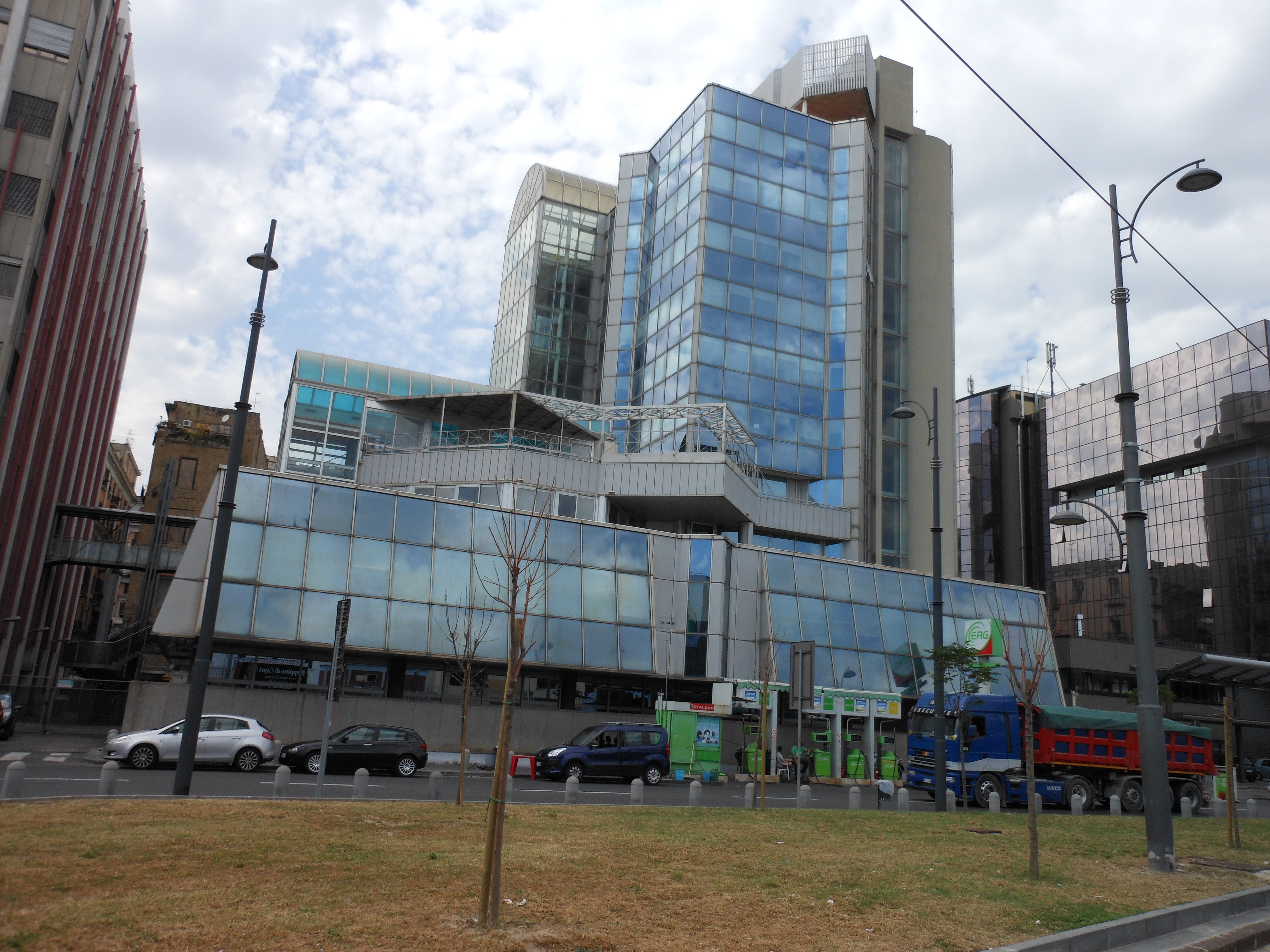 L'edificio sede della facoltà di Giurisprudenza dell'università Federico II di Napoli, con ingresso da via Porta di Massa. Facciata prospiciente via Marina.